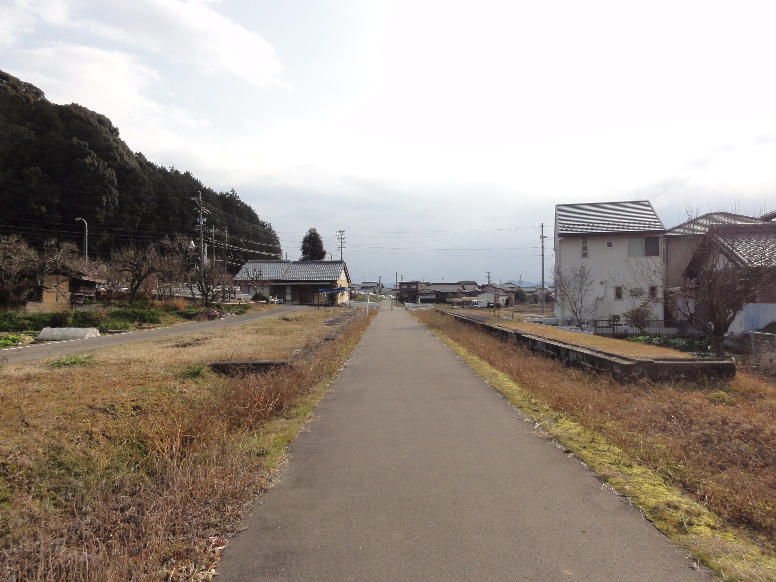 神光寺駅 (名鉄) 跡地